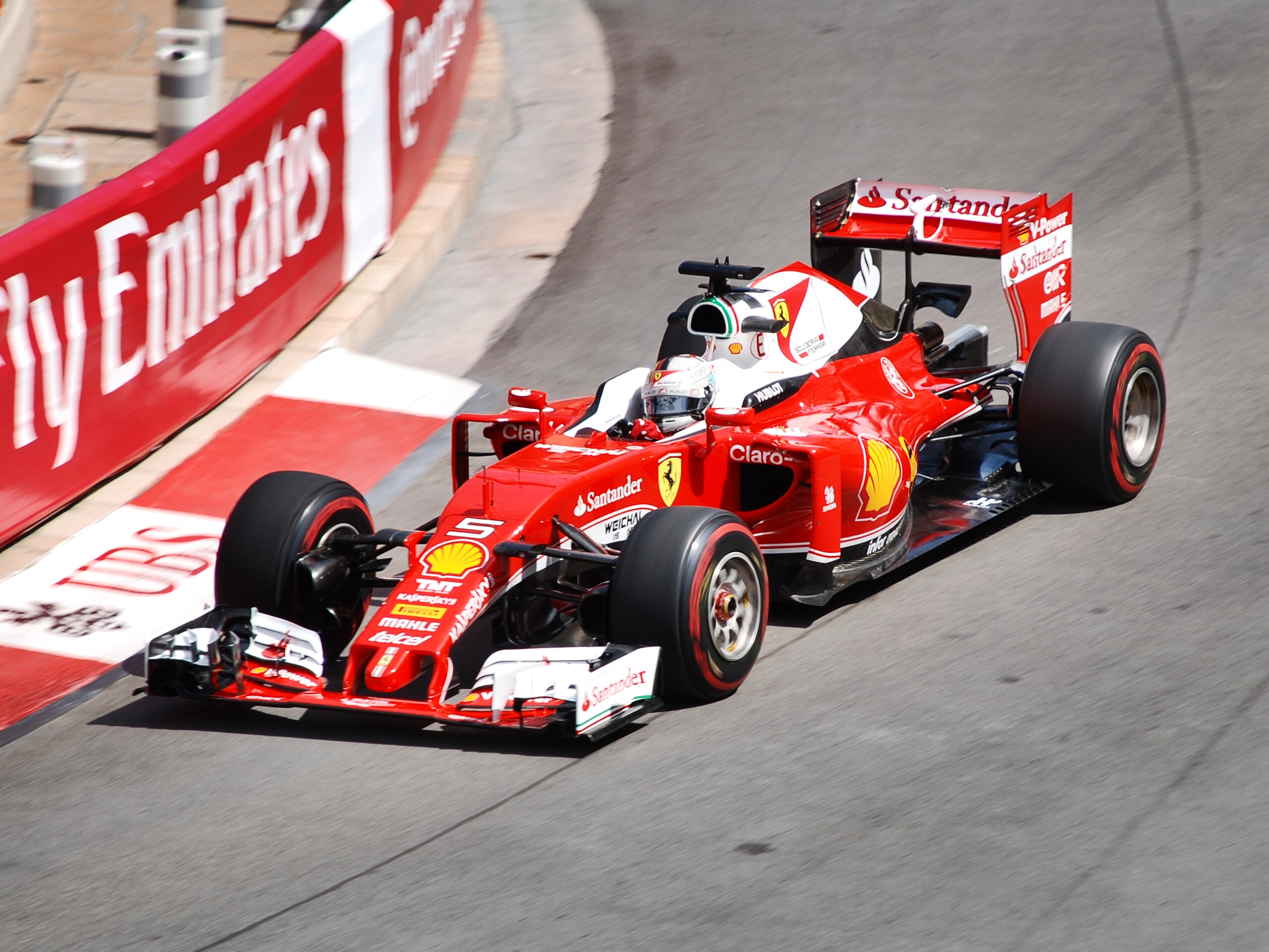 2016 Monaco F1 Grand Prix. Sebastian Vettel, Ferrari SF16-H.